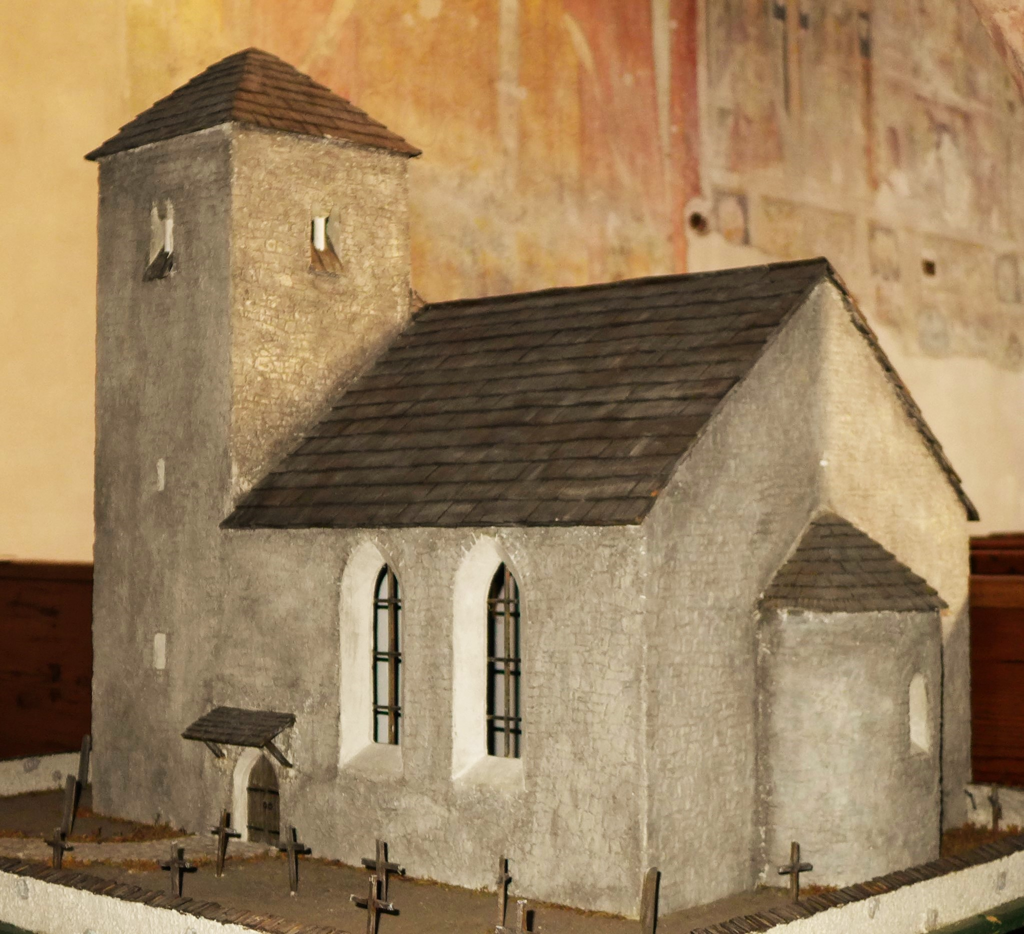 Alte Pfarrkirche St. Martin (Garmisch-Partenkirchen), Modell der Kirche zum Bauzustand um das Jahr 1280 nach dem ersten Erweiterungsbau nach Süden, Maßstab 1:50, Modell von Bartlechner zum Festzug 1200 Jahre Germares Gauwe im Jahr 2002